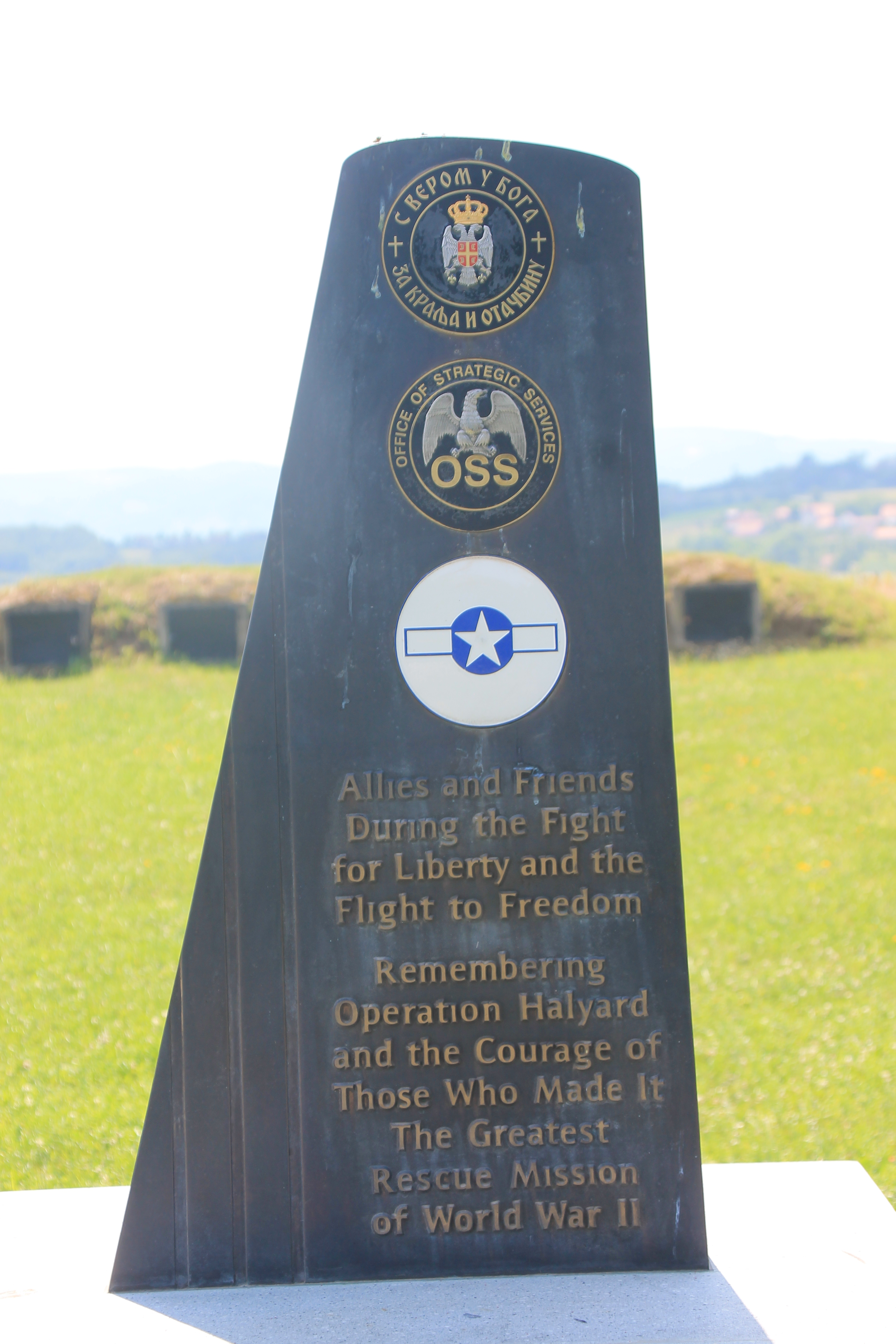 Galovića polje